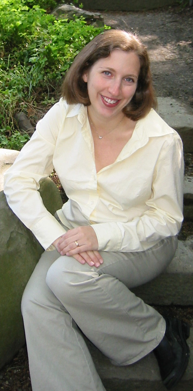 Dara Horn